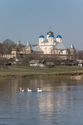 Межиріч, Острозький район, Рівненська область